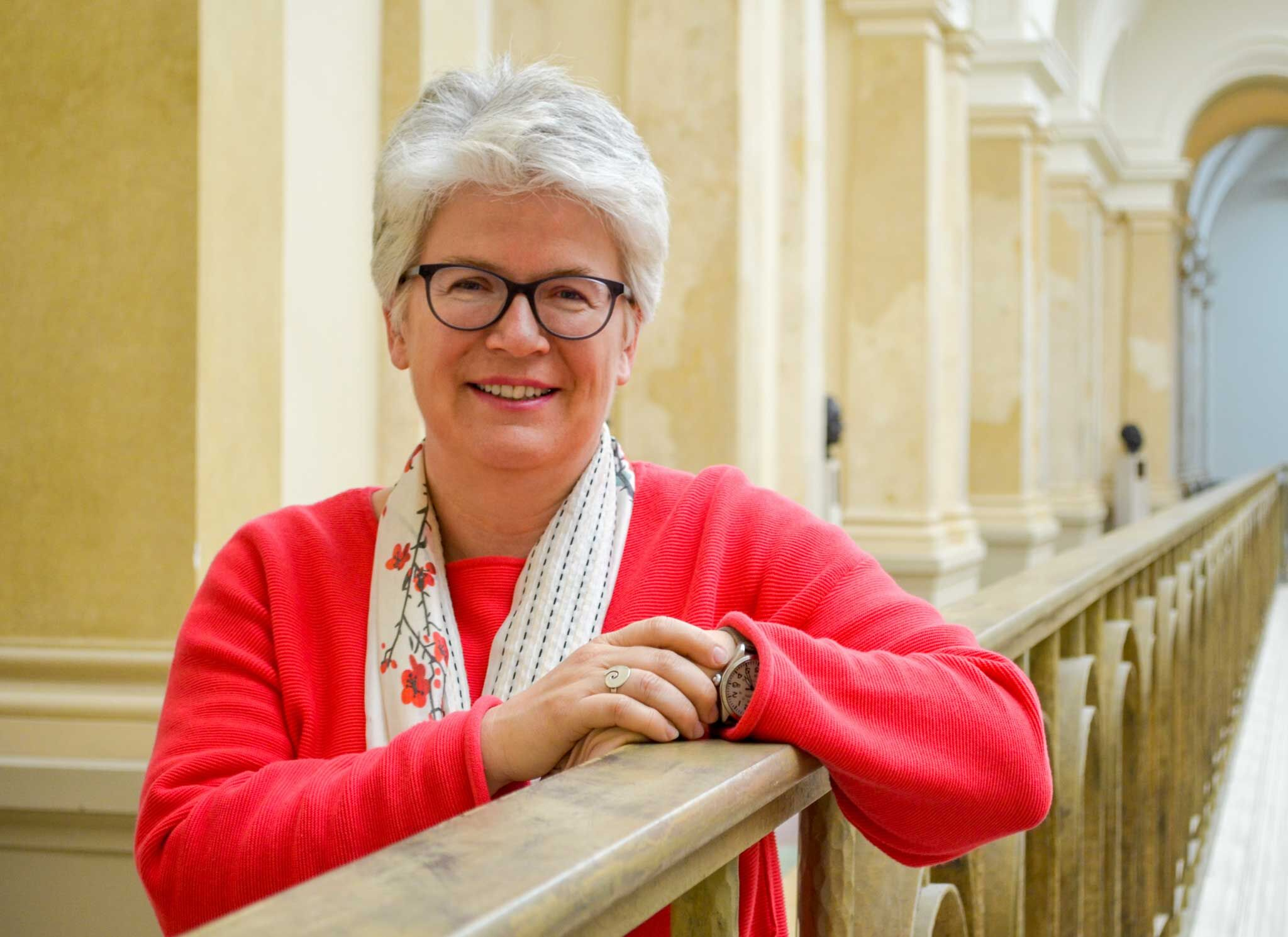 Stefanie Remlinger, Abgeordnete der Grünen-Fraktion Berlin